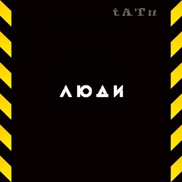 Cover des Albums "Lyudi Invalidy" der russischen Gruppe t.A.T.u.